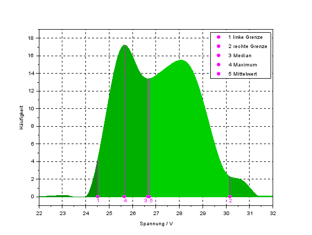 Beschreibende Merkmale eines Histogramms aus dem Spannungssignal beim MAG-Kurzlichtbogenschweißen